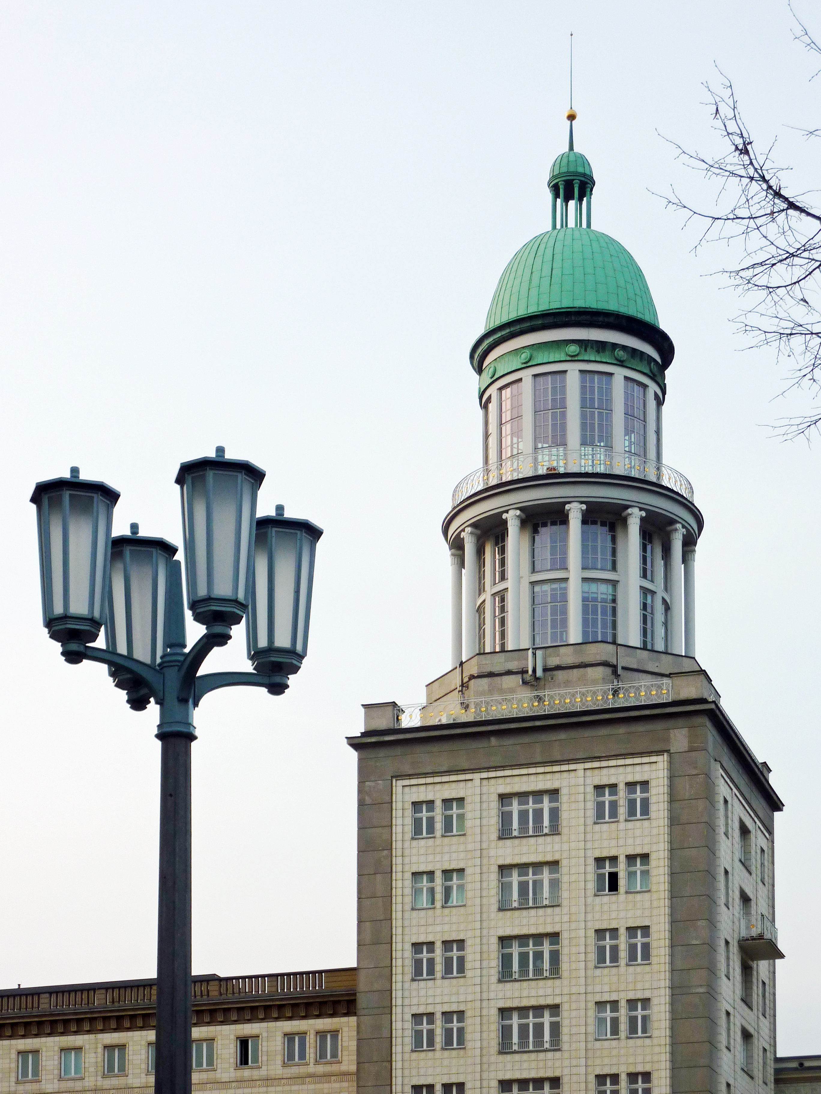 Nordturm des Frankfurter Tores in Berlin-Friedrichshain und Straßenleuchte der Südseite.